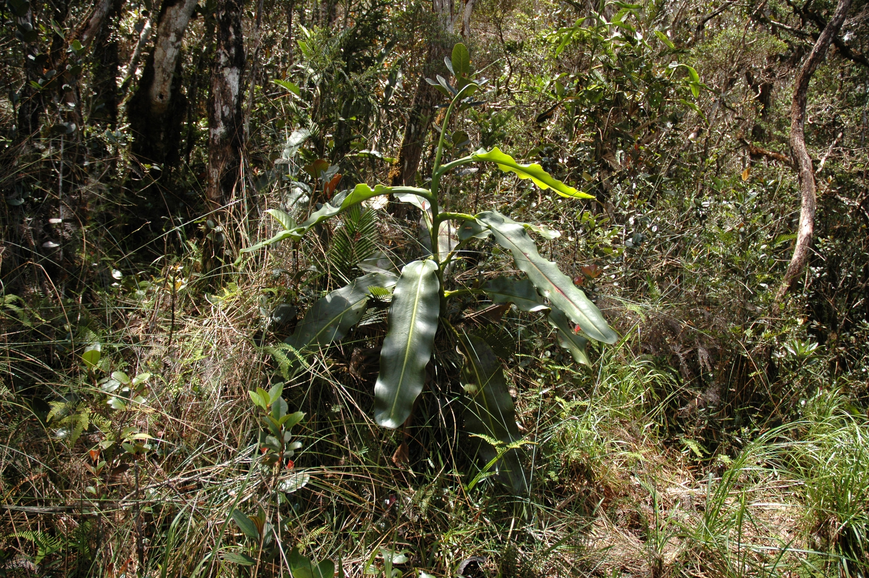 Nepenthes rajah Kinabalu by Jeremiah Harris